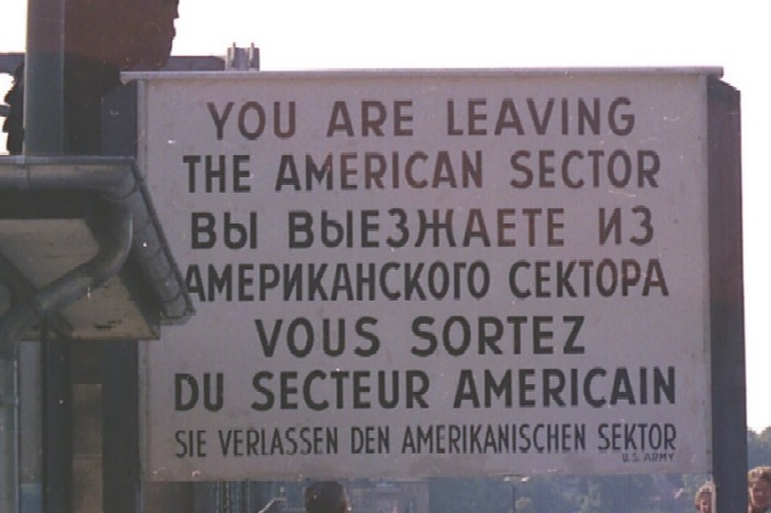 You are leaving... Tabule na sektorové hranici v Západním Berlíně (Glienicker Brücke) – opouštíte americký sektor Pramen: vlastní fotografie -jkb- 1985 licence: GNU FDL